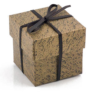 Свадебная бонбоньерка